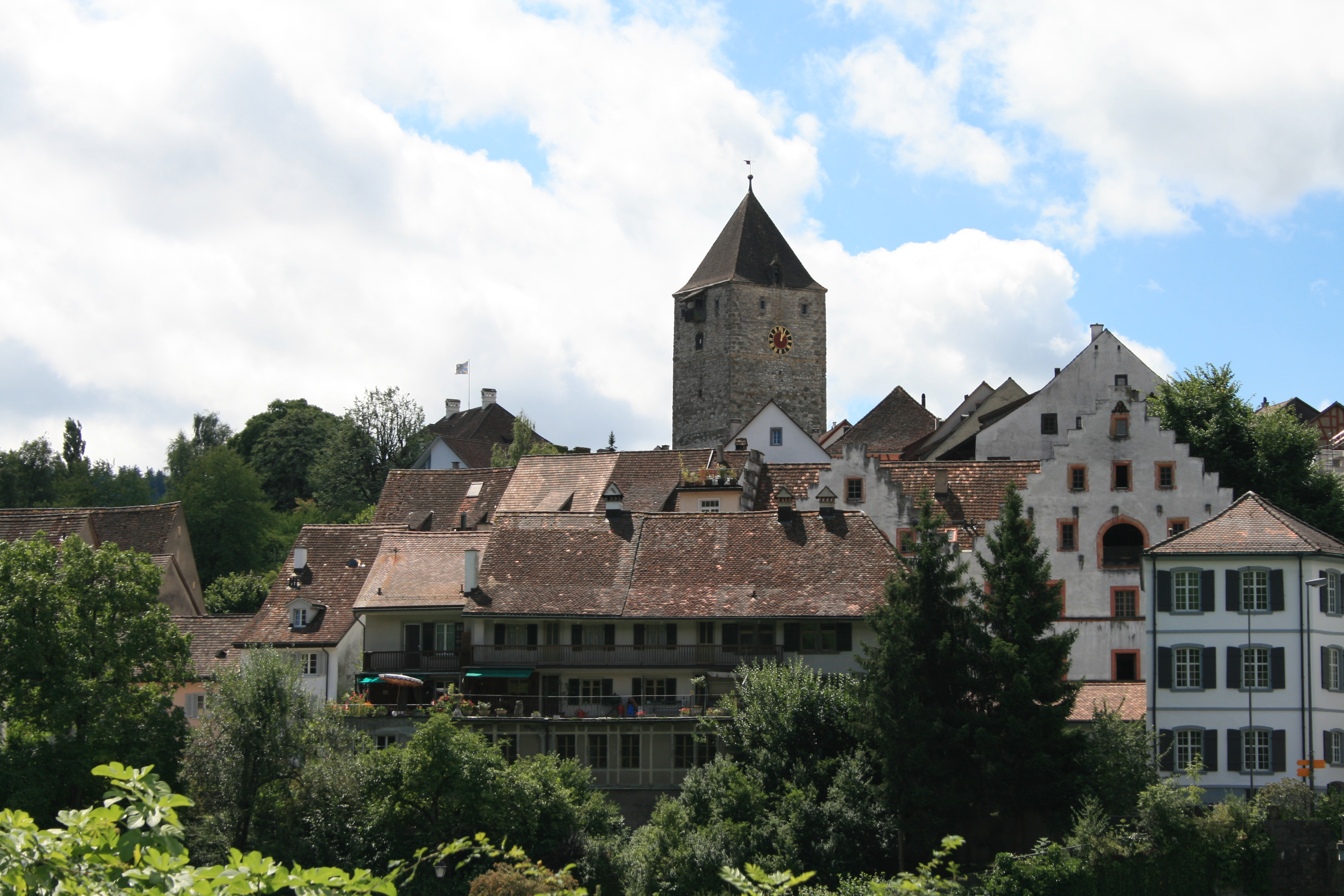 Kaiserstuhl AG, Switzerland